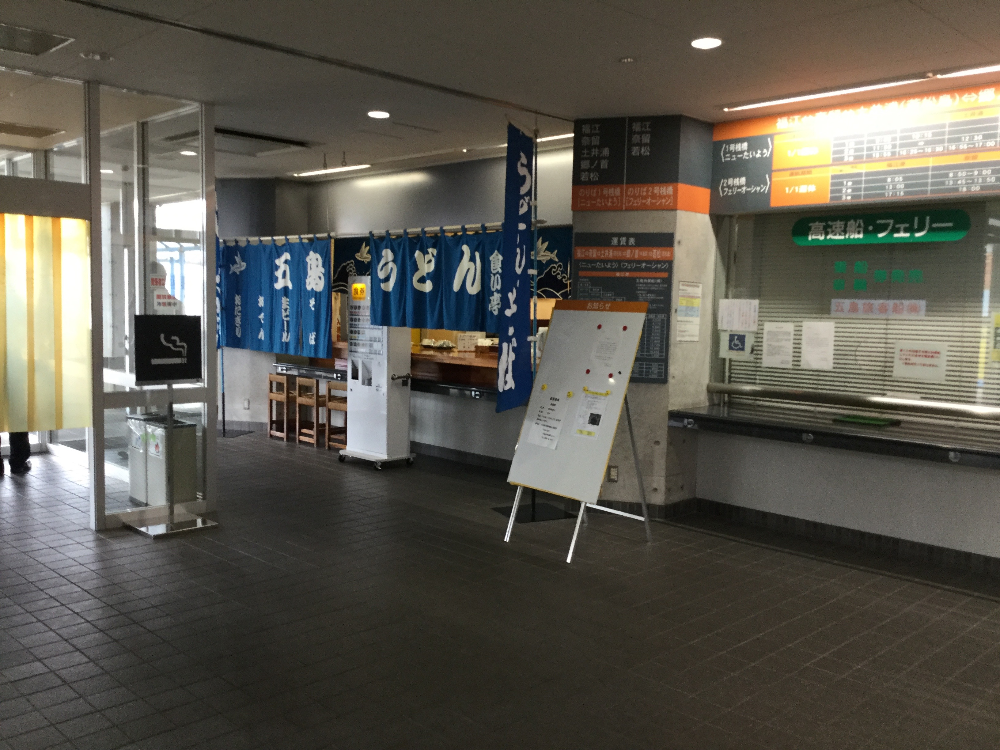 goto_20170727083919